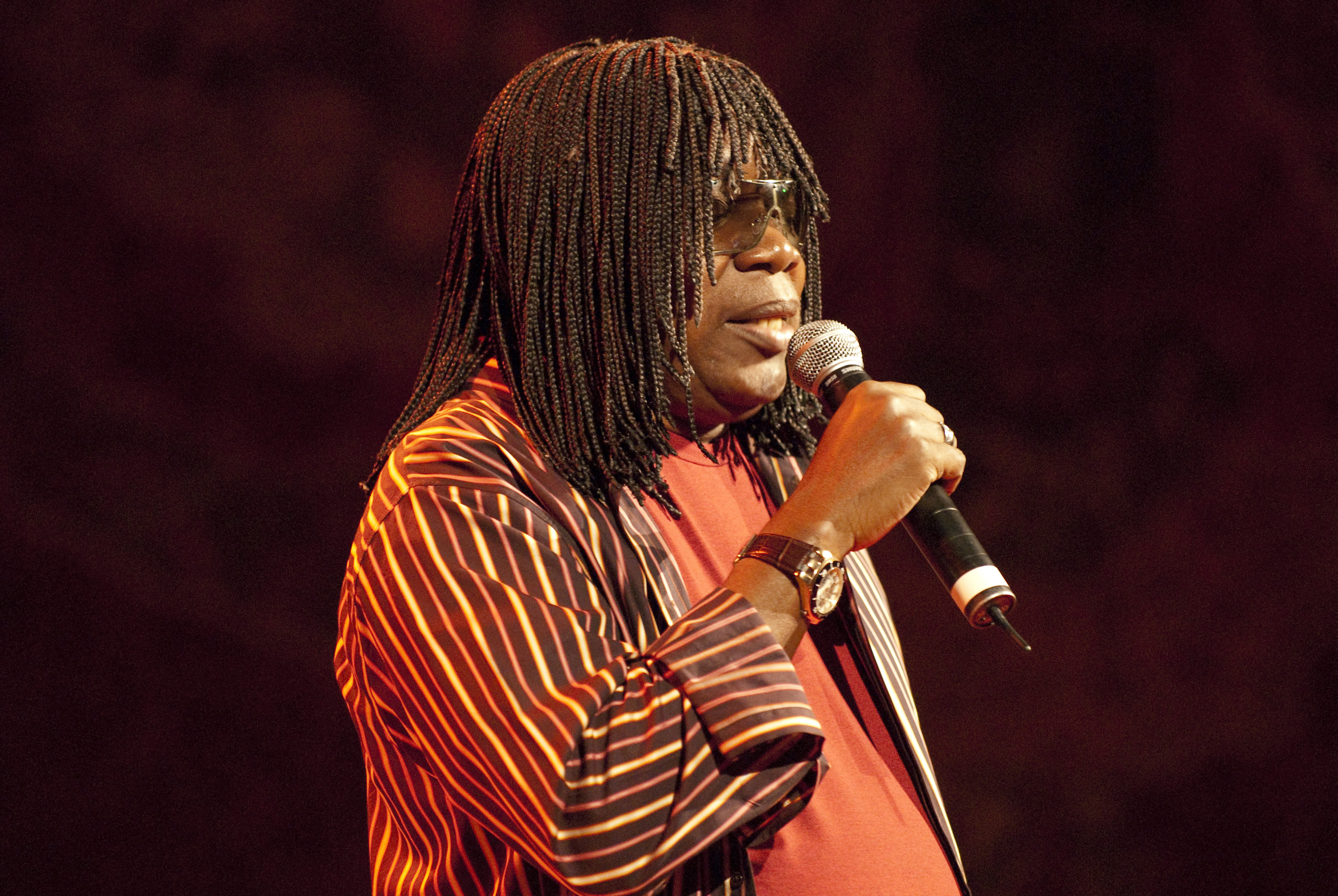 Milton Nascimento